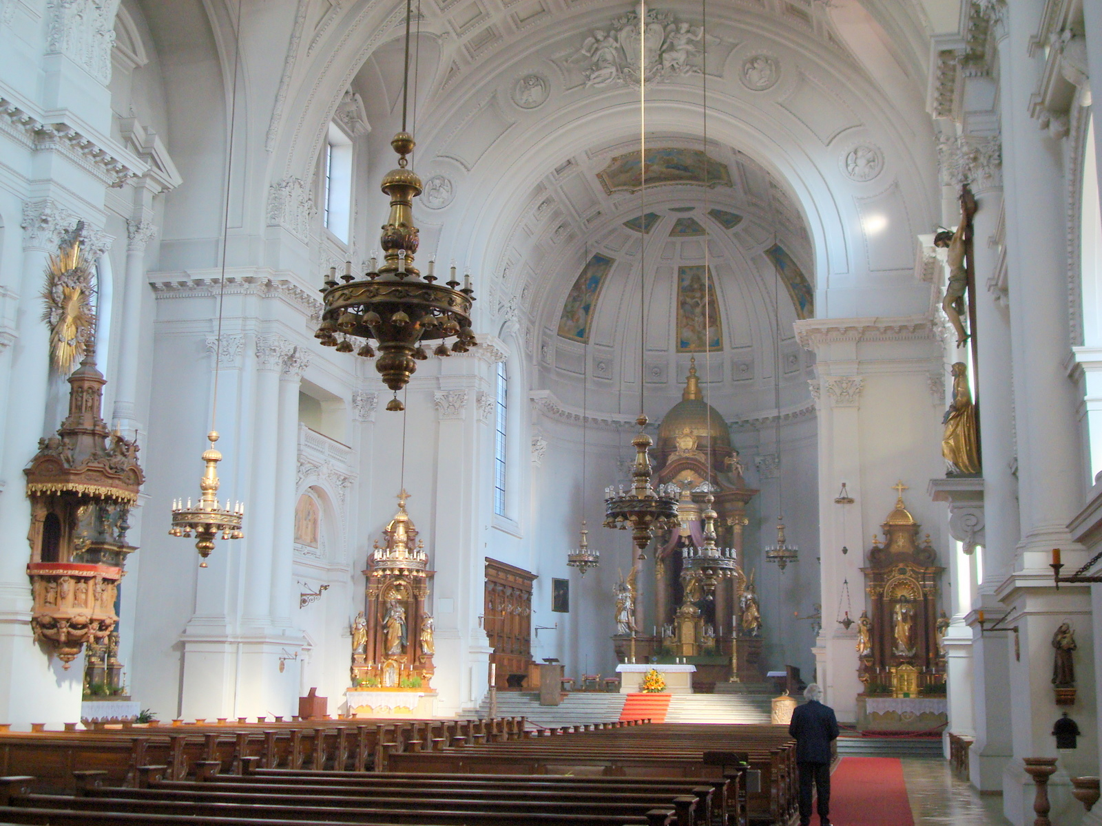 Innenraum der neuen Margaretenkirche in München-Sendling